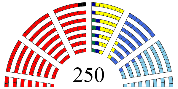 Parlamentarni izbori 1993 - raspodela mandata